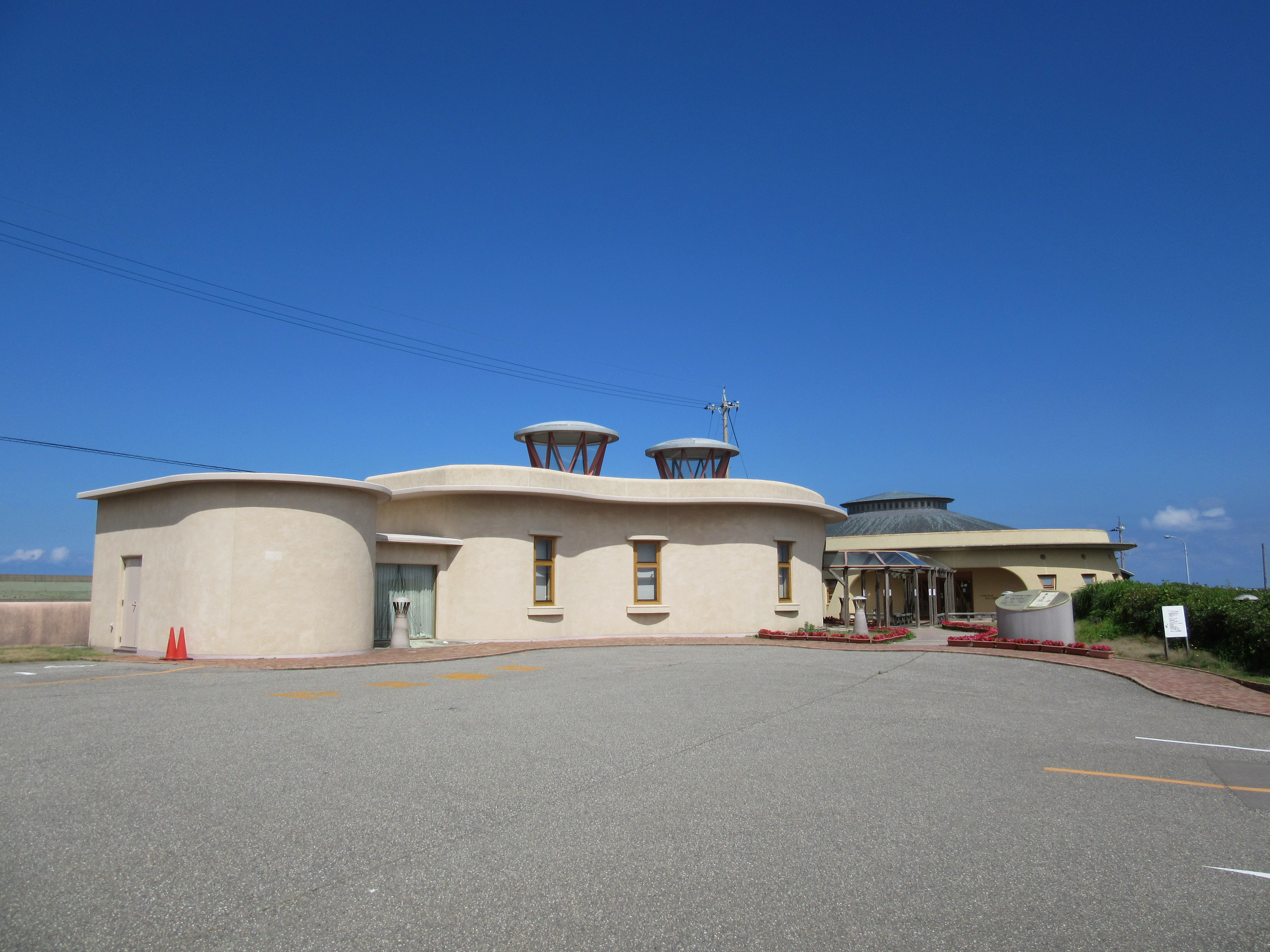 石川県金沢港大野からくり記念館